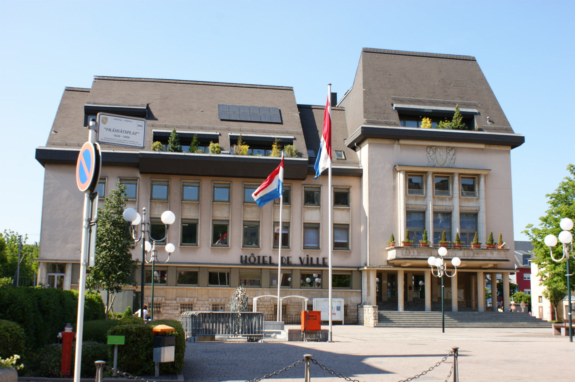 D'Schëfflenger Gemengenhaus.